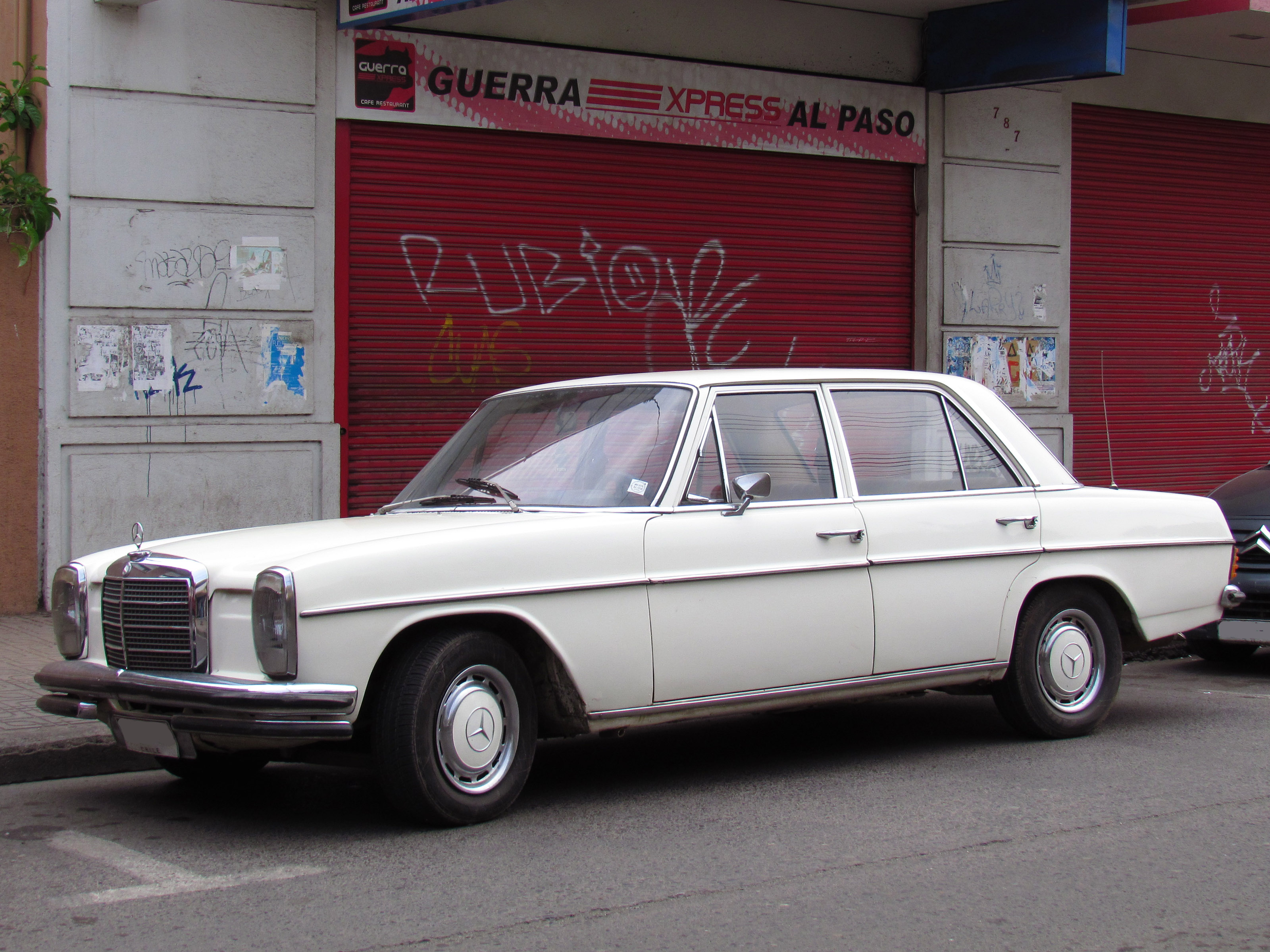 Mercedes Benz 250 1971